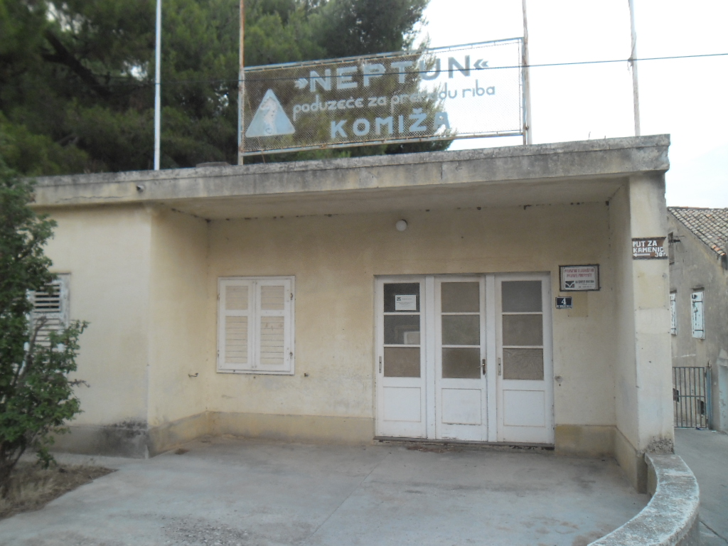 Komiža